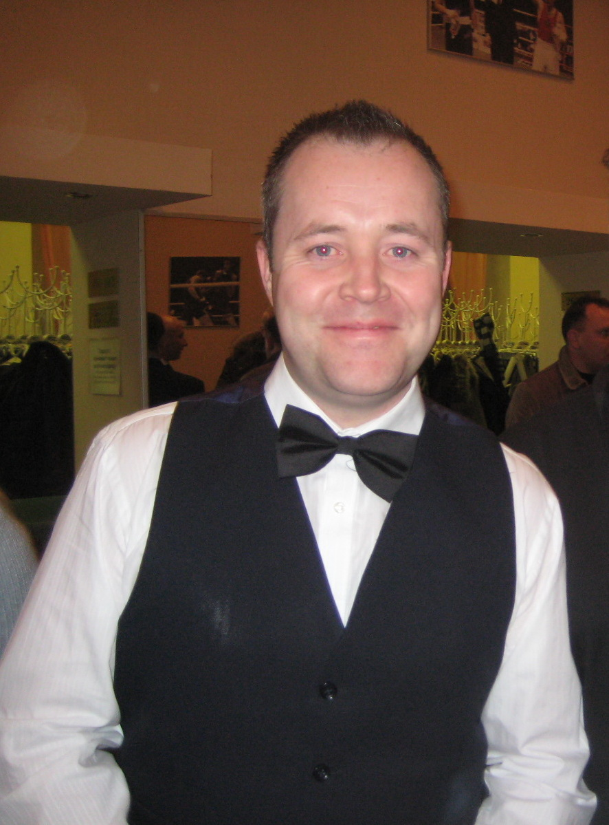 Туринир World Series of Snooker в Москве